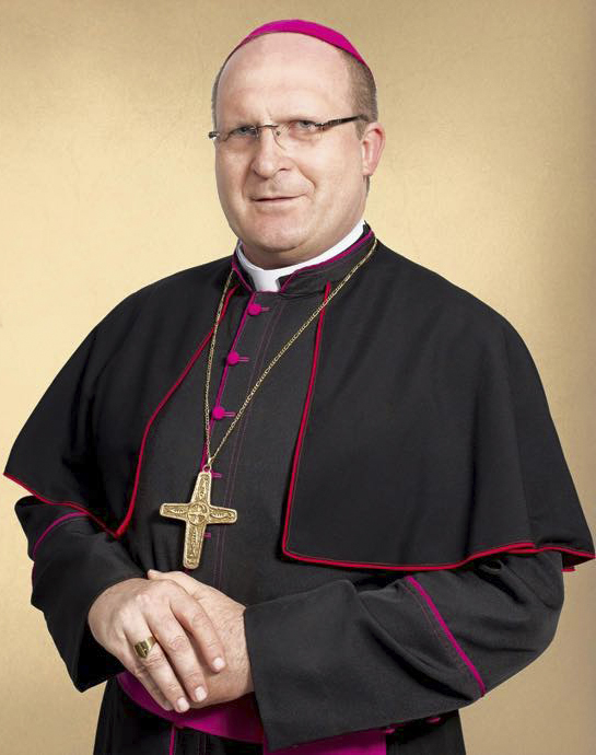 Dom Peruzzo, arcebispo de Curitiba